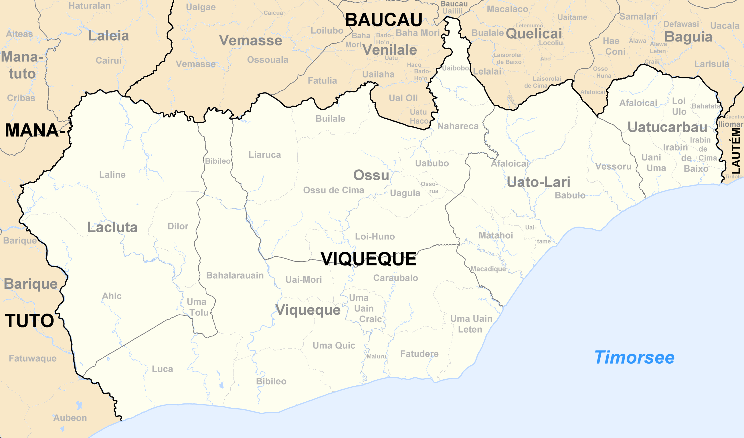 Sucos des Distrikts Viqueque/Osttimor nach der Neustrukturierung 2004